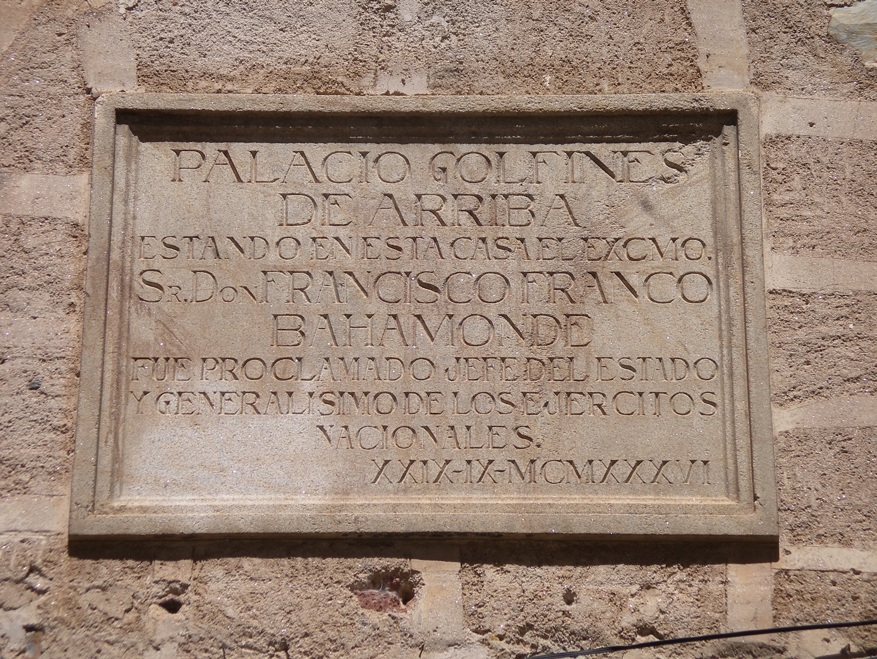 Palacio Golfines de Arriba. Caceres